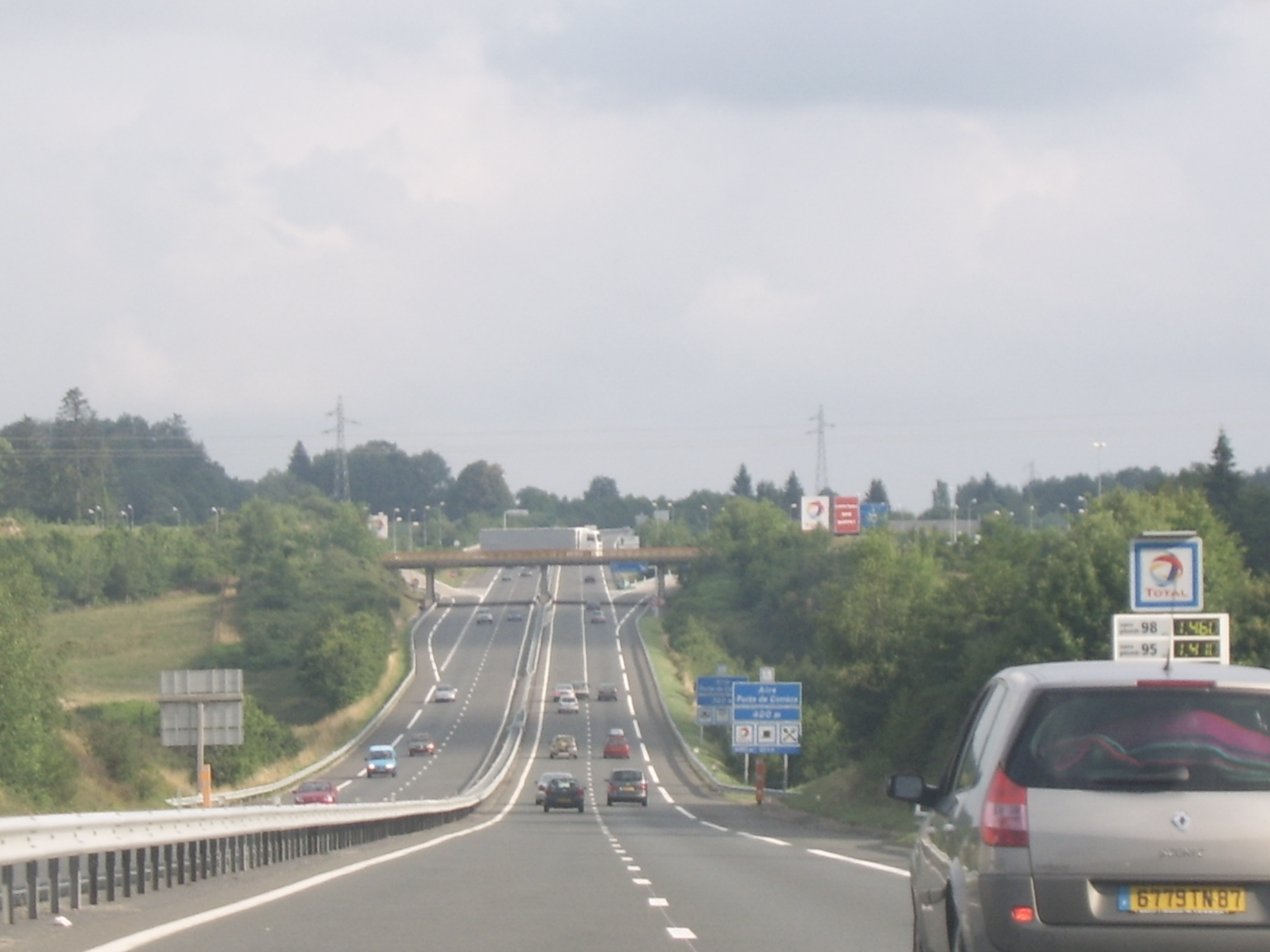 L'A20 au niveau de l'aire Porte-de-Corrèze